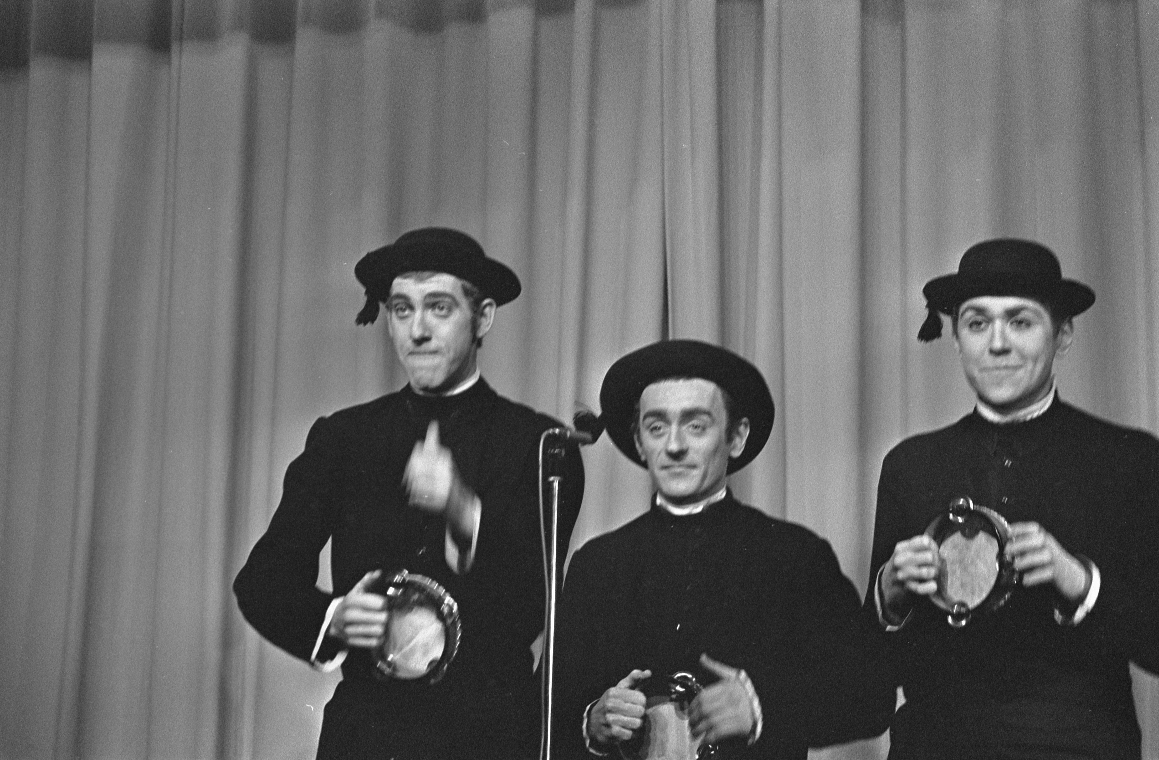 Collectie / Archief : Fotocollectie Anefo Reportage / Serie : [ onbekend ] Beschrijving : Bij Dorus op schoot, in zijn theater in Rotterdam, nummer van (v.l.n.r.) Peter de Jong , Karel de Rooij , Nico van Hulst Annotatie : Peter de Jong en Karel de Rooij werden later bekend als het komische muzikale duo "Mini & Maxi" Datum : 24 januari 1968 Locatie : Rotterdam, Zuid-Holland Trefwoorden : artiesten, cabaret, toneel Persoonsnaam : Hulst Nico, Jong Peter de, Rooij Karel de Fotograaf : Nijs, Jac. de / Anefo Auteursrechthebbende : Nationaal Archief Materiaalsoort : Negatief (zwart/wit) Nummer archiefinventaris : bekijk toegang 2.24.01.05 Bestanddeelnummer : 921-0167